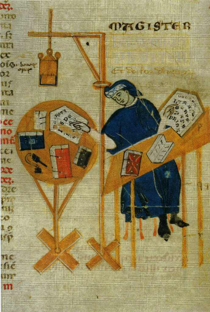 Magister beim Literaturstudium. Illustration zum Decretum Gratiani ist auch als doctor decretorum bezeichnet, trägt aber den Talar der Artistenfakultät. Zimelien S. 88 vermerkt, daß der Namen Hermannus presbyter durch Rasur getilgt wurde, dies aber im Original noch lesbar sei.